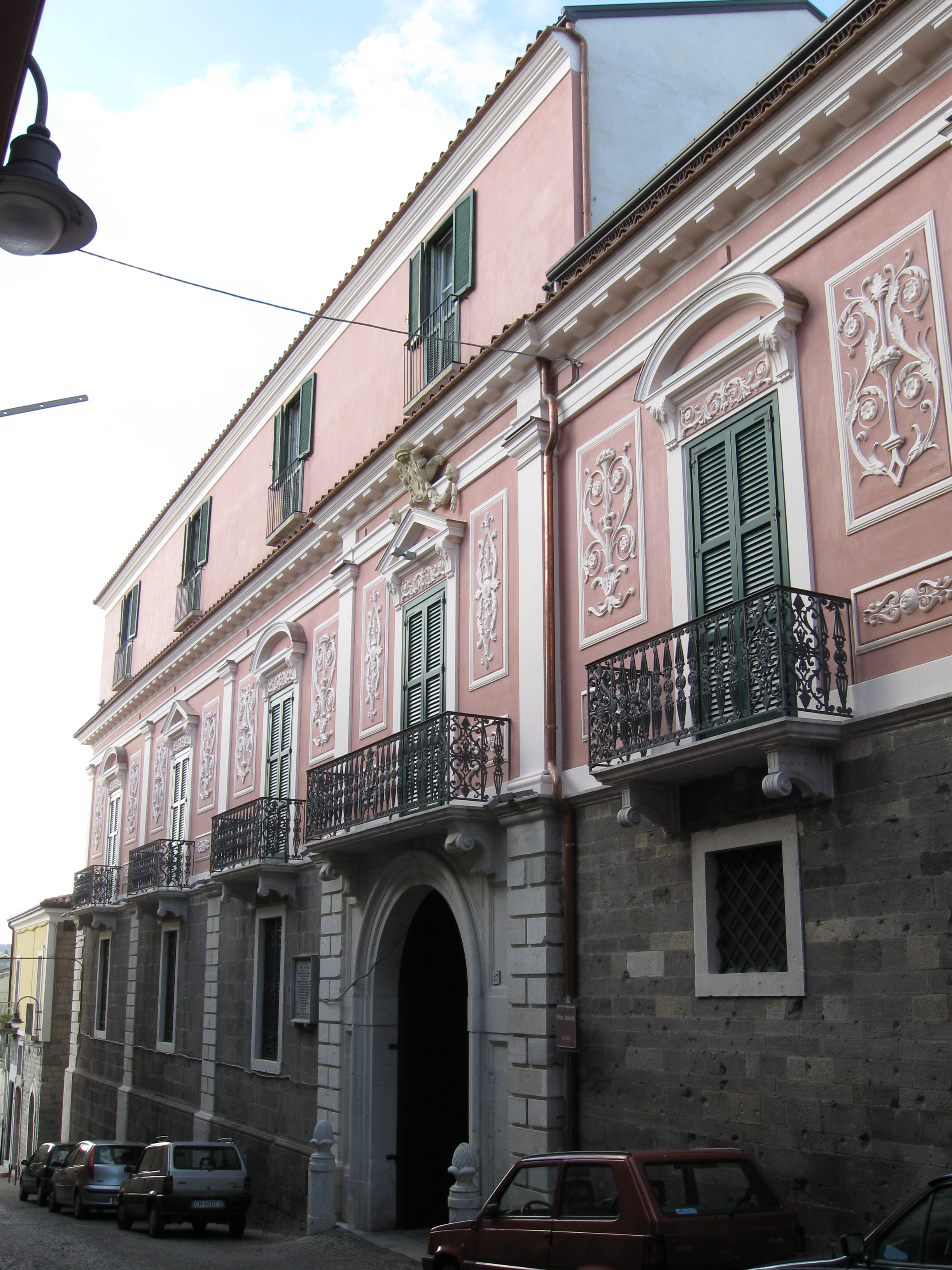 Palazzo Aquilecchia, Melfi, Basilicata